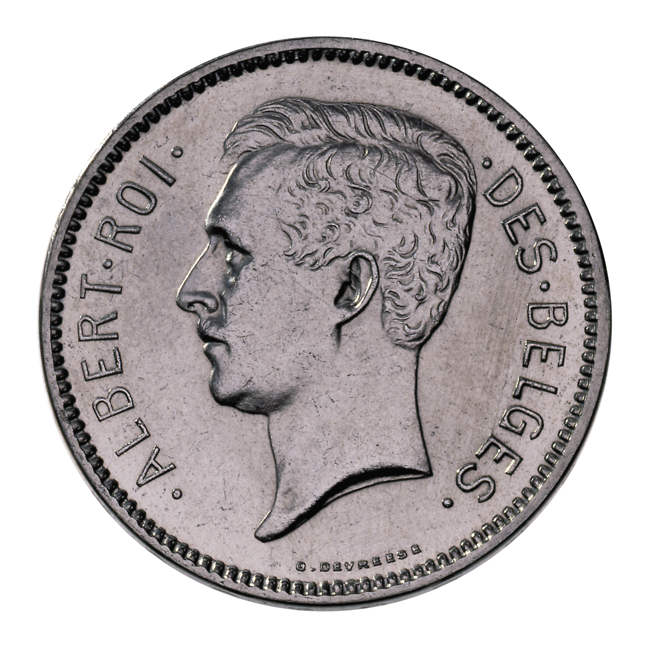 Pièce belge de 5 francs ou 1 belga (Albert Ier) en français - avers